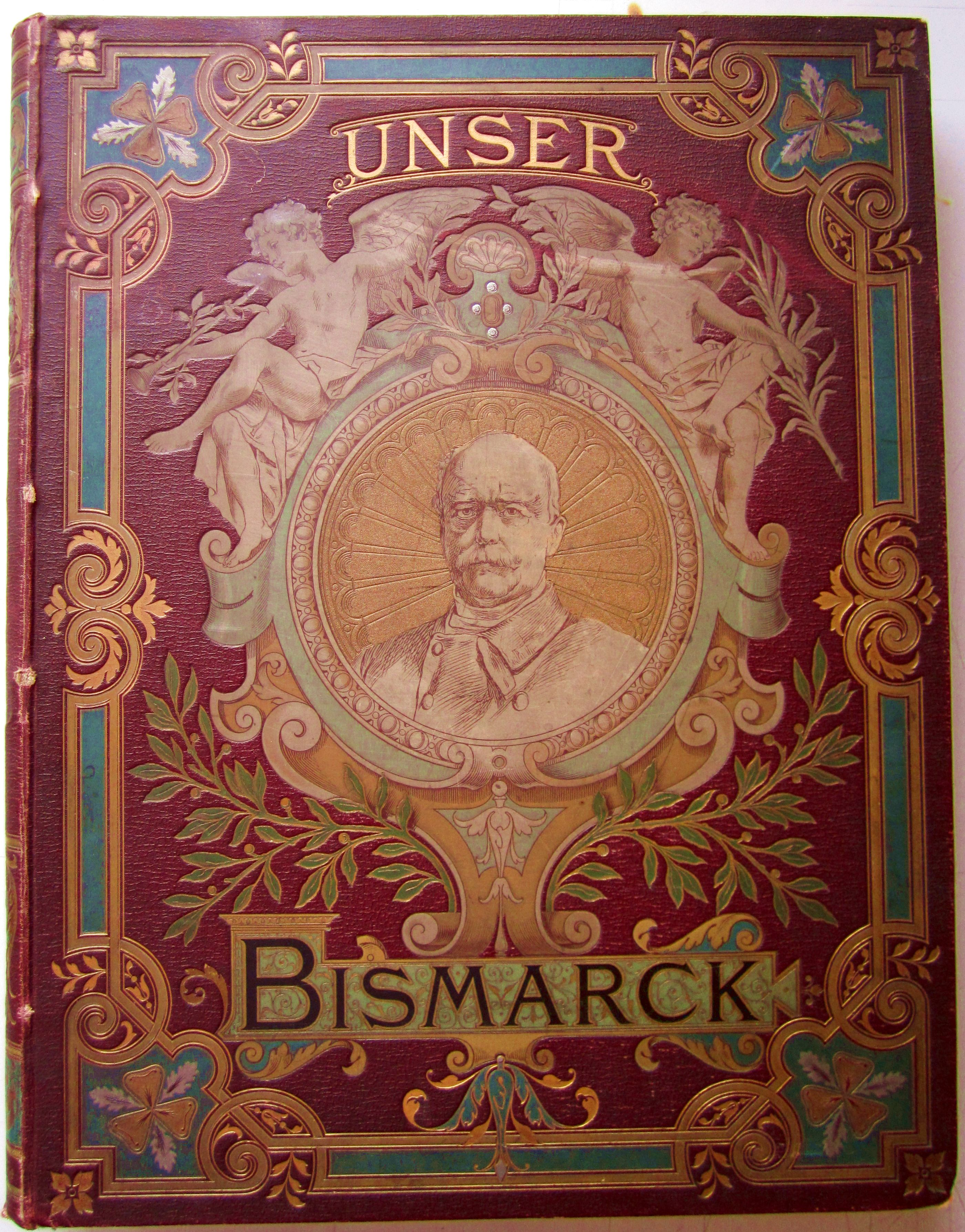 Titelseite des Buchs "Unser Bismarck"